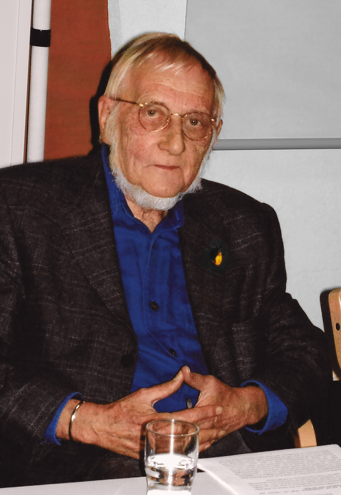 Rainer Schmidt bei der Jahrestagung für Individualpsychologie 2007 in Mainz